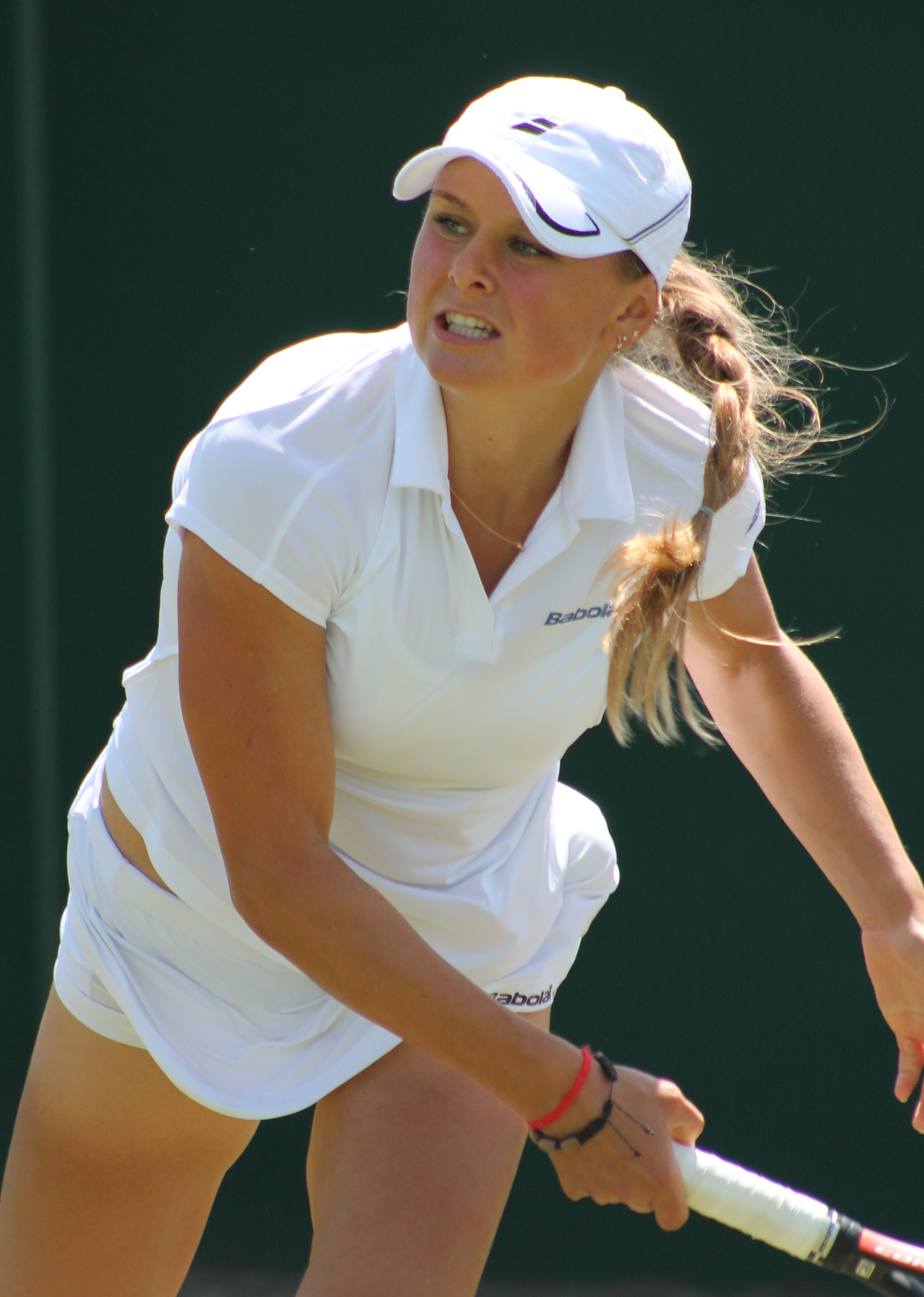 Kozlova WMQ14 (3)